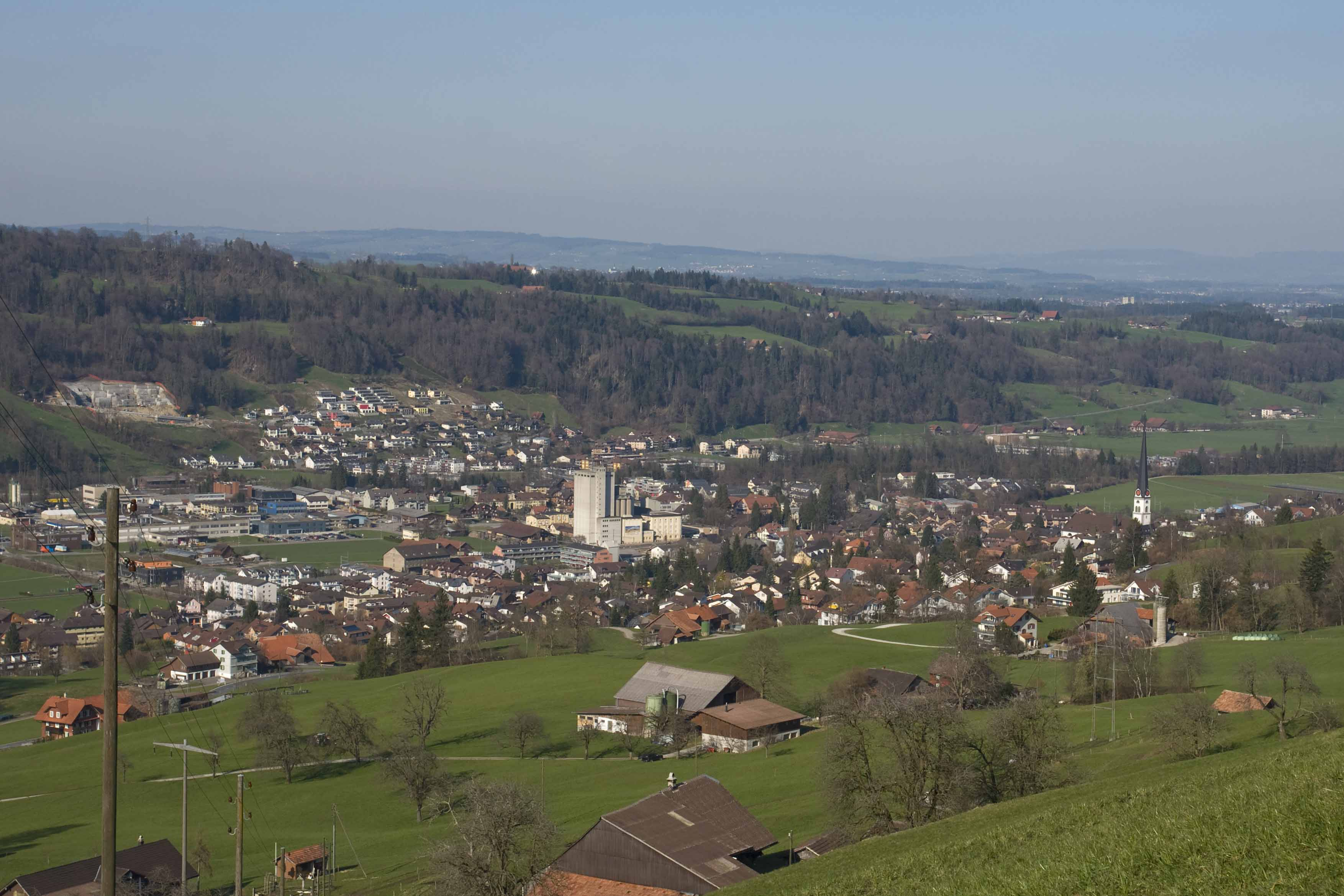 Malters von Schwarzenberg aus gesehen